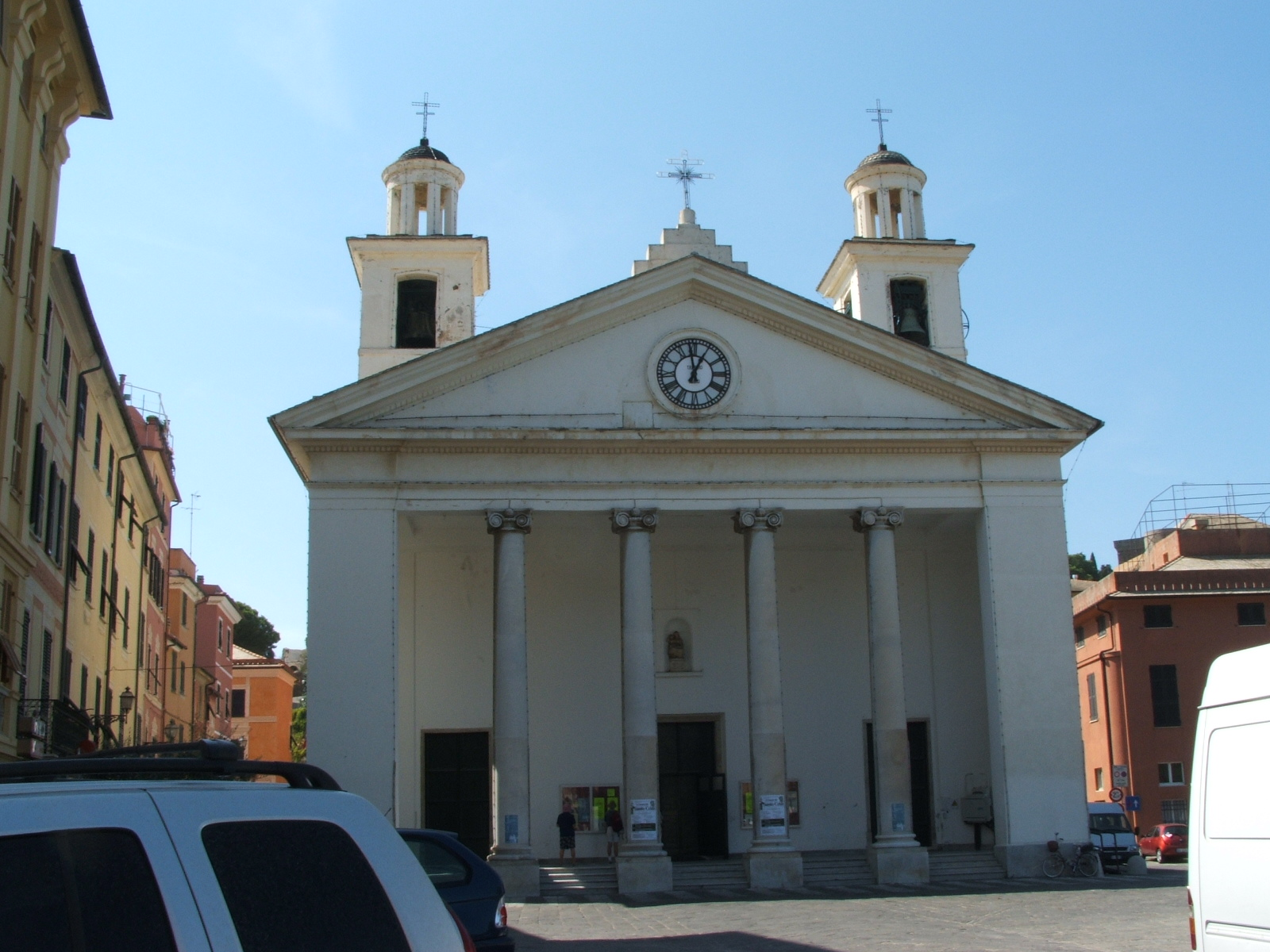 Immagine da Sestri Levante